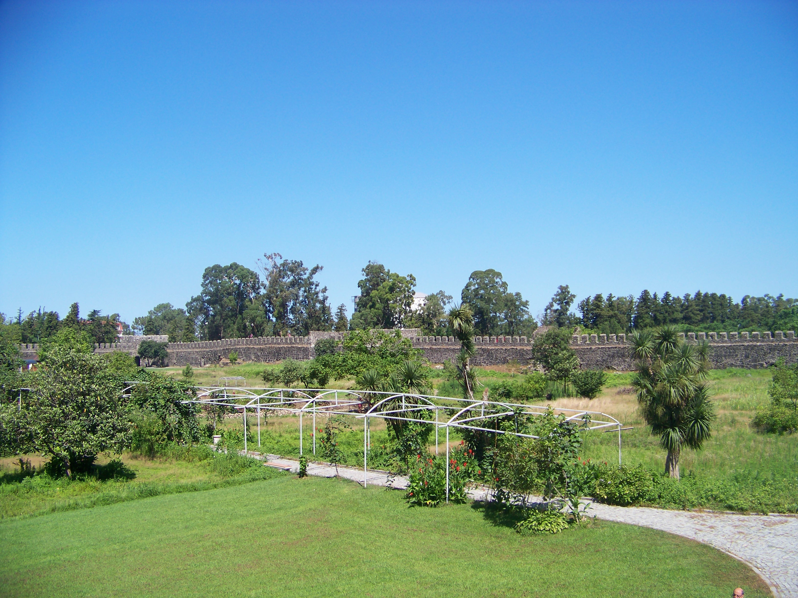 გონიოს ციხესიმაგრის ზოგადი ხედი